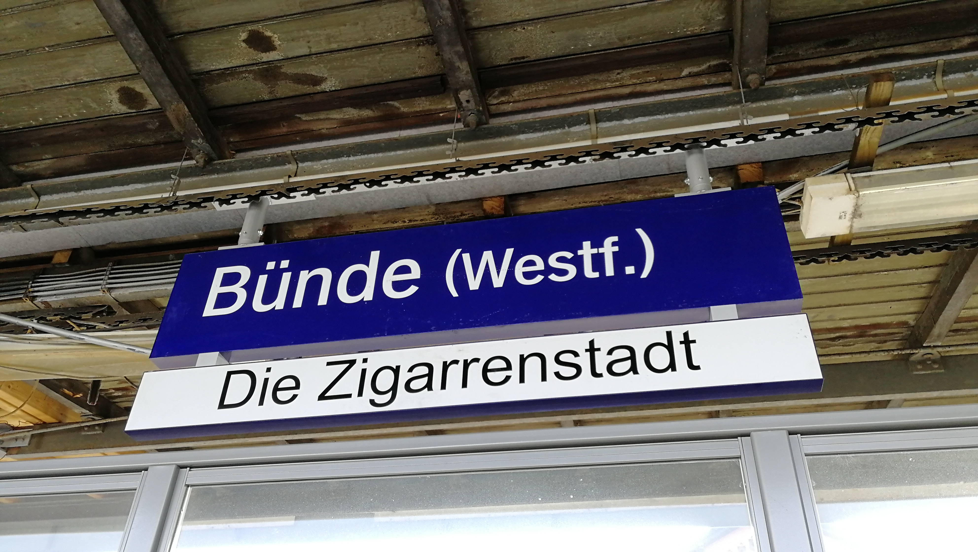 Bahnhofsschild Bünde (Westf.) mit Zusatzschild "Die Zigarrenstadt"